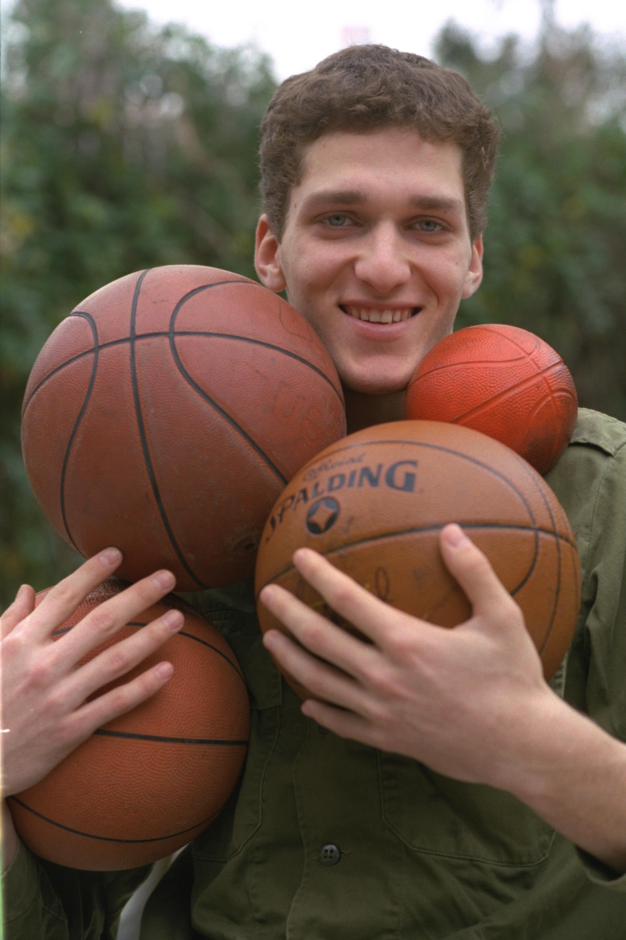 Doron Sheffer, a member of Hapoel Galil Elyon. דורון שפר, הפועל גליל עליון Photo: ALPERT NATHAN, 01/25/1993